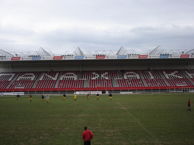 Kostas Davourlis Stadium in Greece.